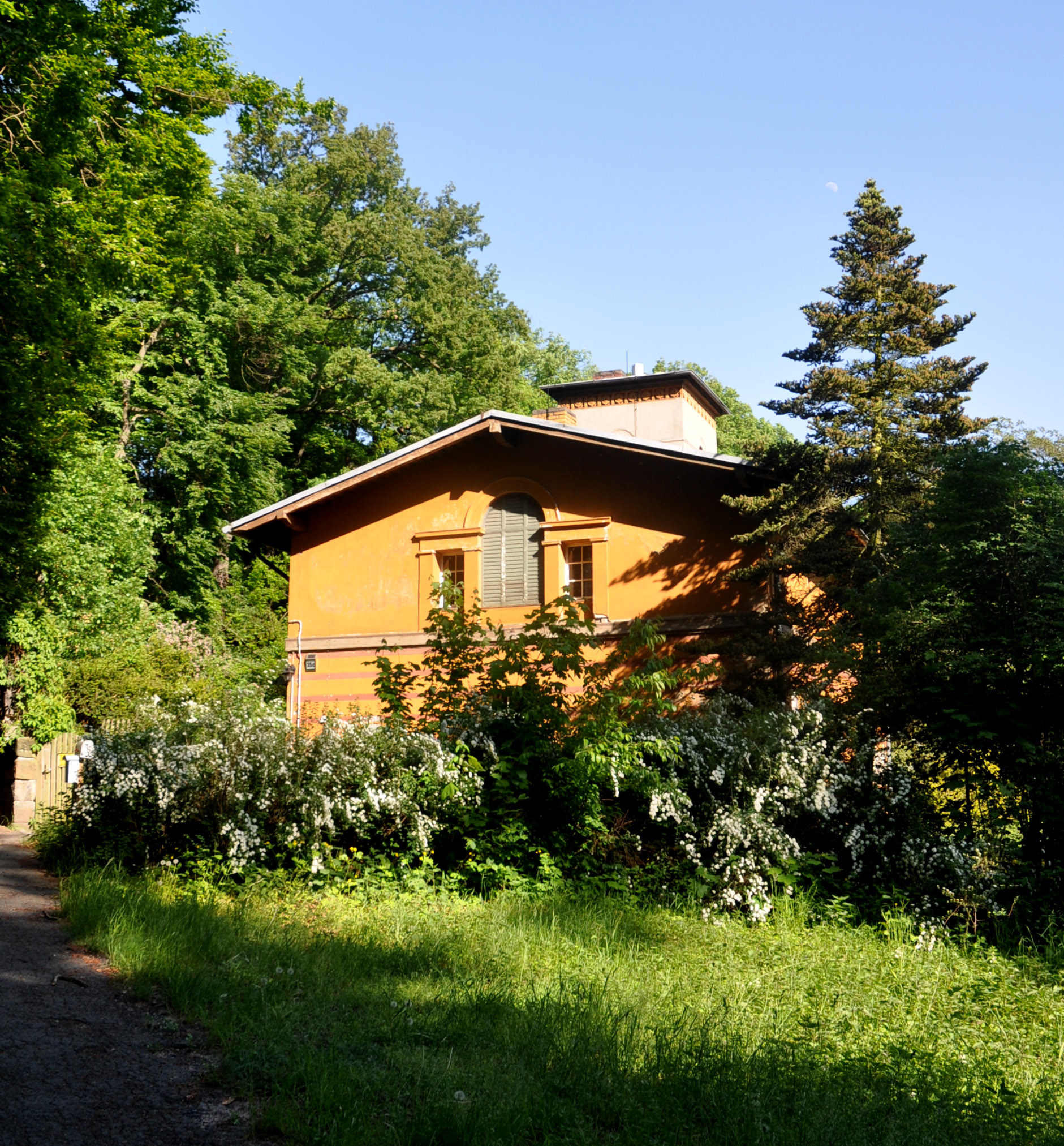 Matrosenhaus vom Drive her gesehen